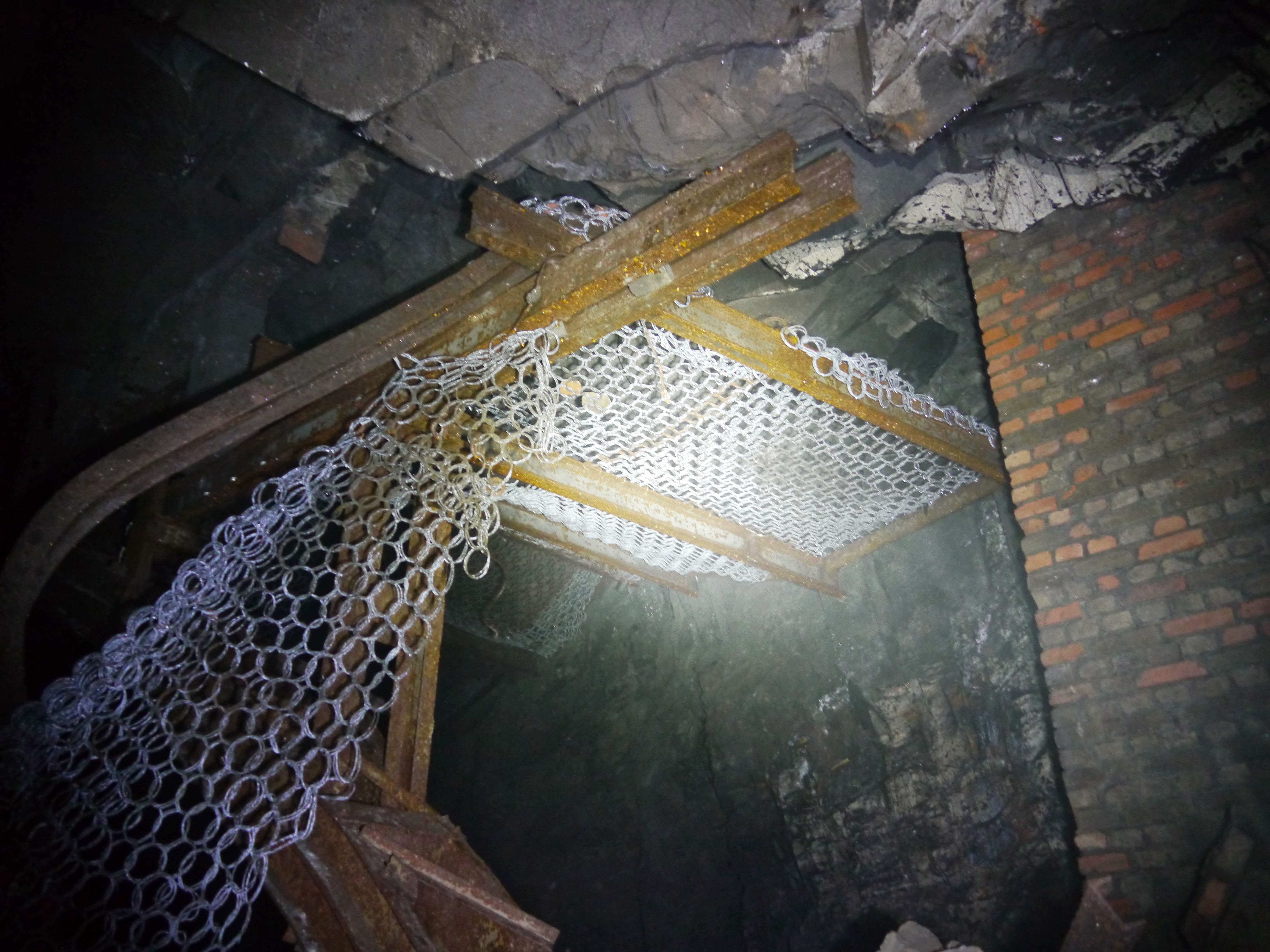 Torpedoschutznetz zweckentfremdet gegen Steinschlag in der U-Verlagerung „ZW 8 Lehesten“ (Triebwerkstestanlage im Ortelsbruch, Lehesten, Thüringen)